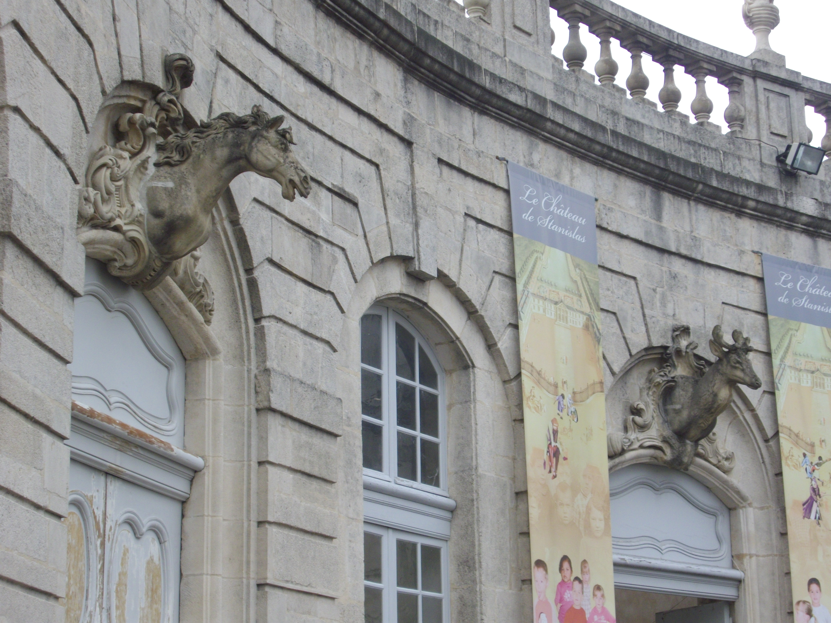 Communs du Château de Commercy (Meuse, France), sculptures de chevaux